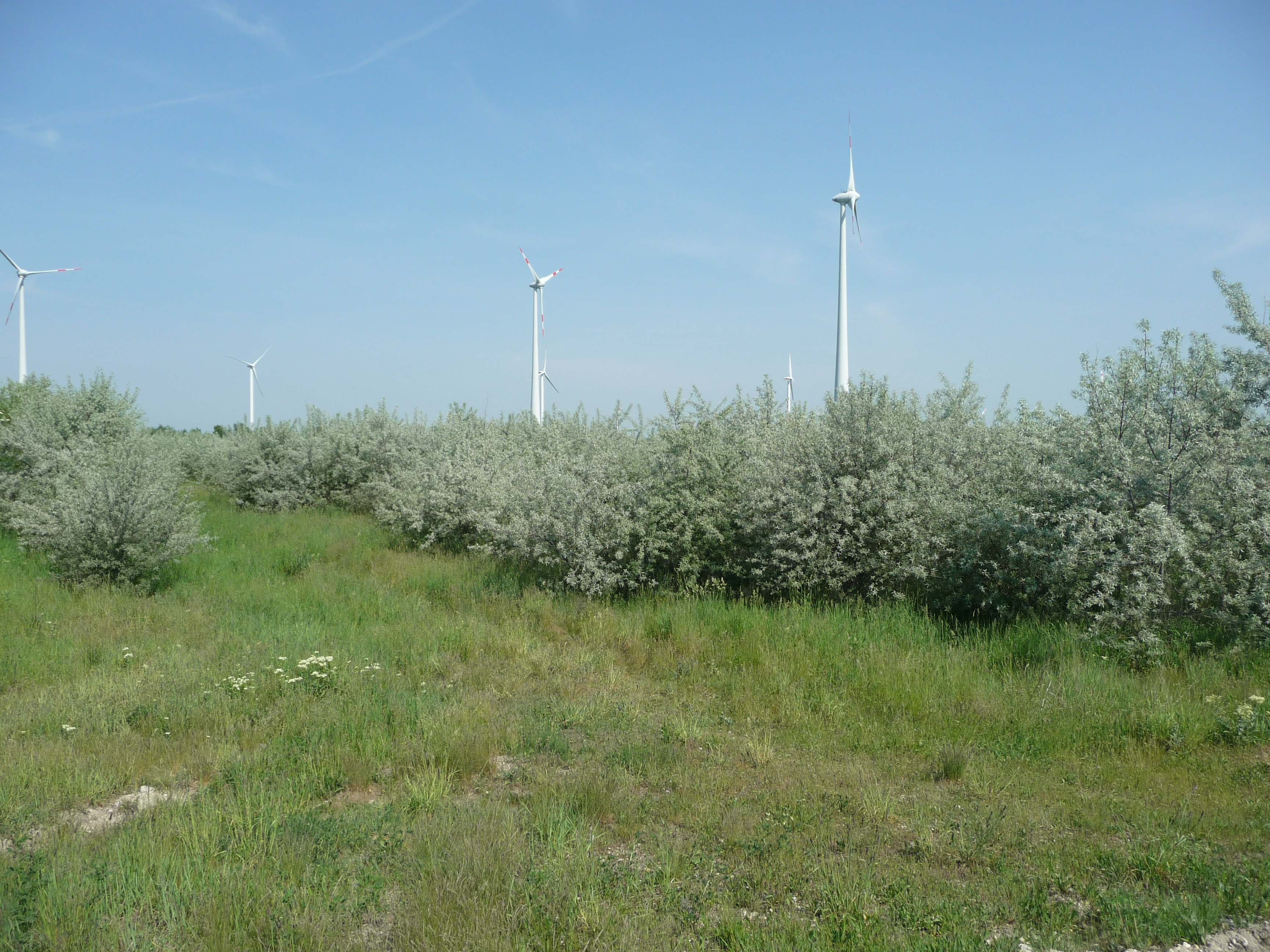 Homoktövis (Hippophae rhamnoides ssp. carpatica) (Mosonmagyaróvár, a timföldgyár rekultivált vörösiszap-tározója, a háttérben szélkerekekkel)